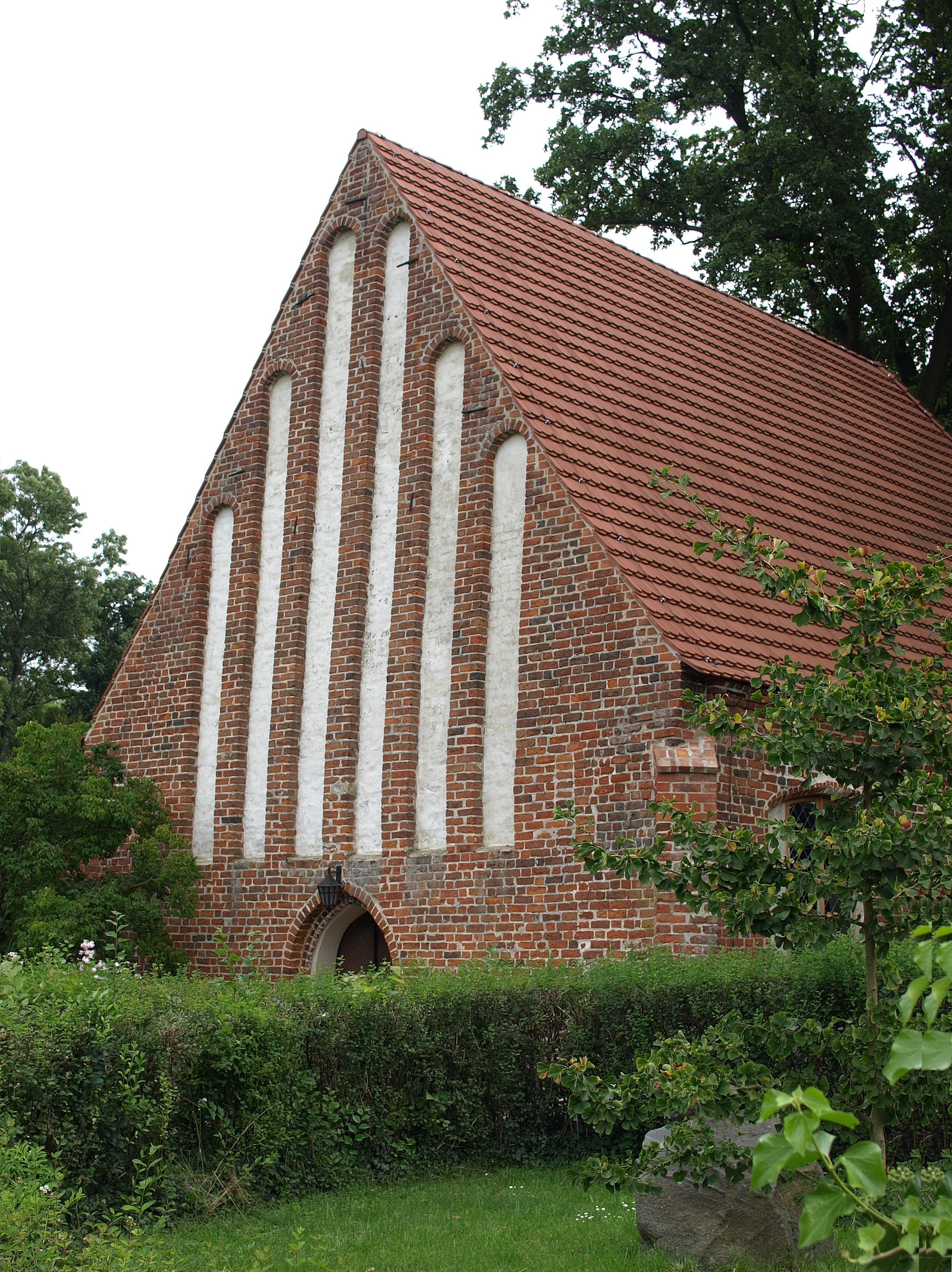 Gothic Church of Morgenitz/ Usedom, Germany Dorfkirche von Morgenitz/ Gemeinde Mellenthin auf Usedom. Westgiebel des Langhauses mit gestaffelten Blendnischen.